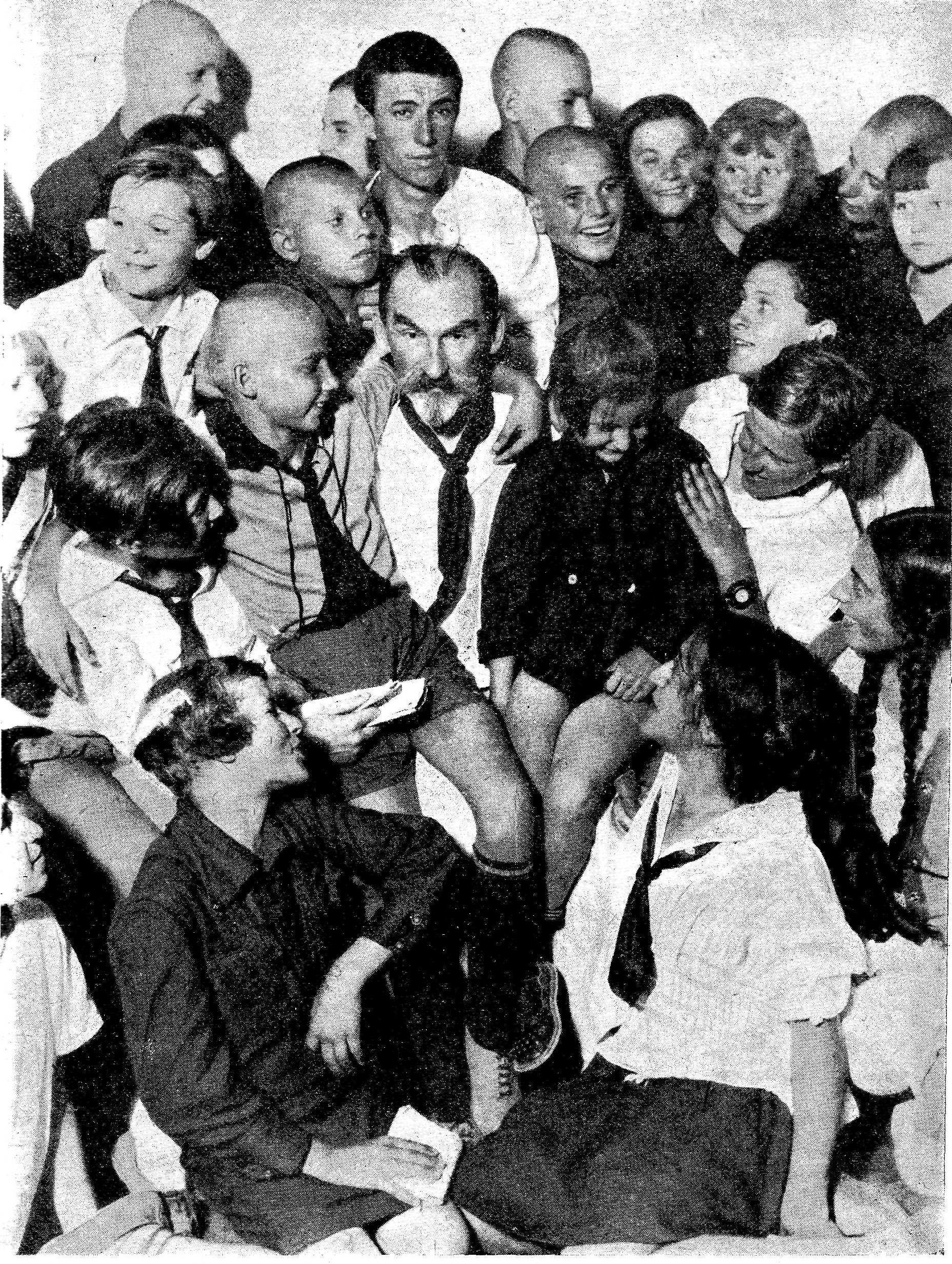 Піонер більшовизму на Україні тов. М. О. Скрипник разом з іншими піонерами.: Скрипник і піонери